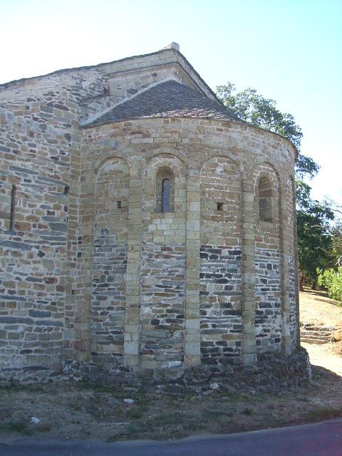 Chapelle de la Trinité de Prunet et Belpuig (66 - Pyrénées Orientales) : Chevet